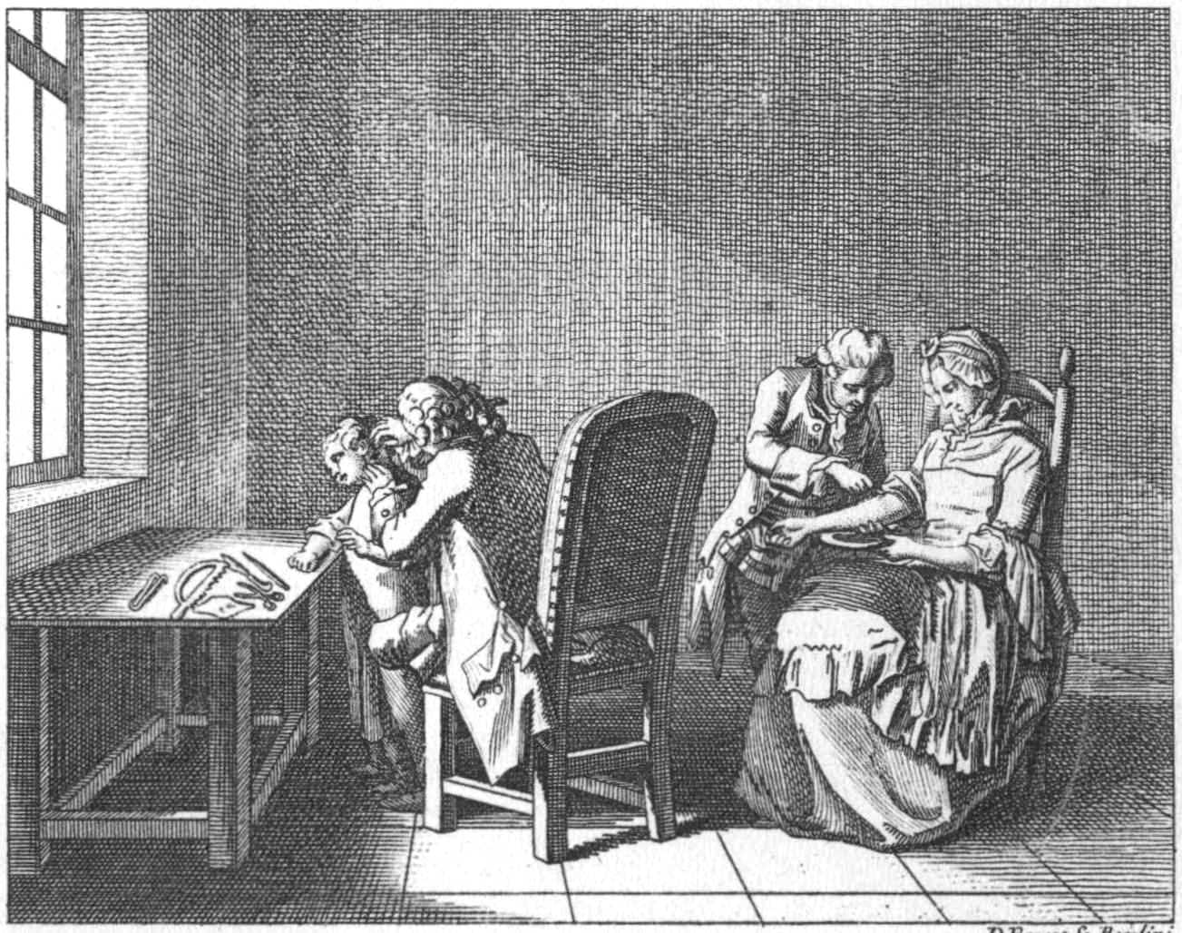 Der menschliche Körper. c) Ein anderes [Kind] unter der Hand des Arztes. Werkzeug, welches vor ihm liegt. Eine Frau, die sich die Ader öffnen läßt. (Beschreibung lt. Quelle)